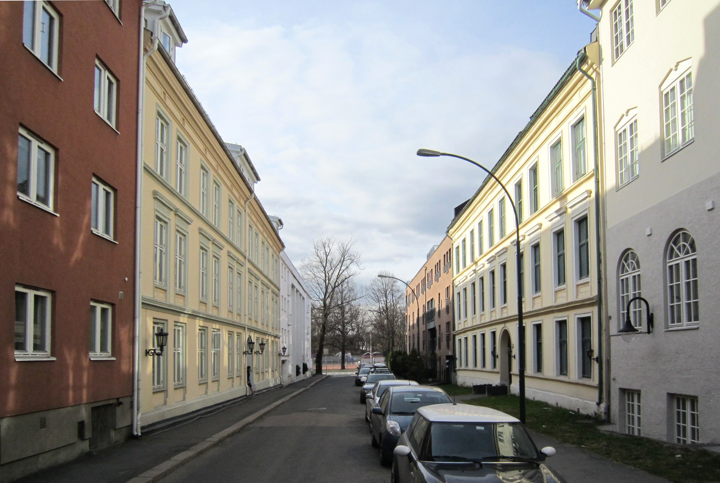 Fuglehauggata på Frogner i Oslo